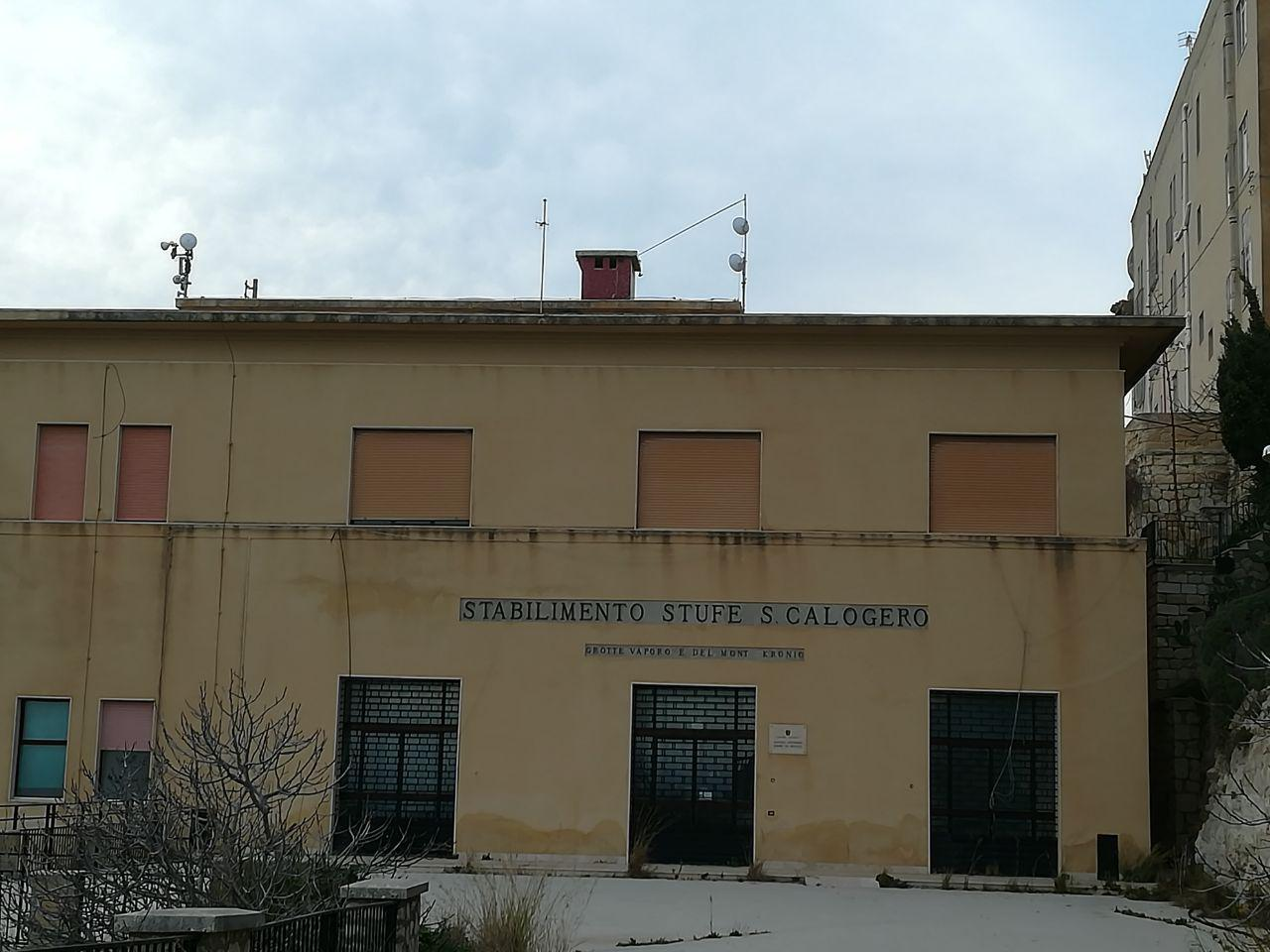 stabilimento termale